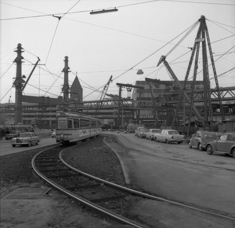 Schwebebahnhof (im Bau) Wuppertal-Barmen-Mitte